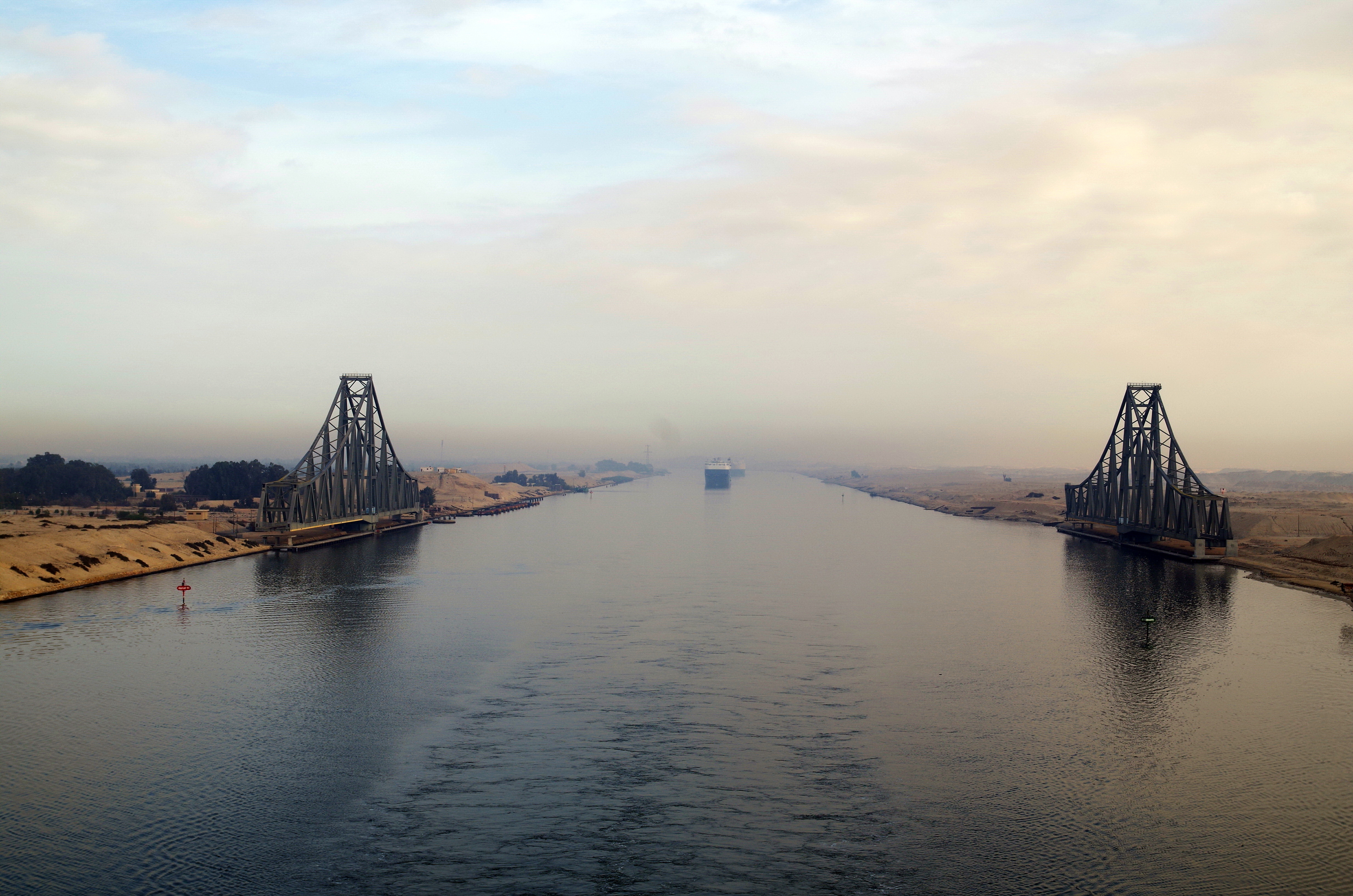 Eisenbahnbrücke